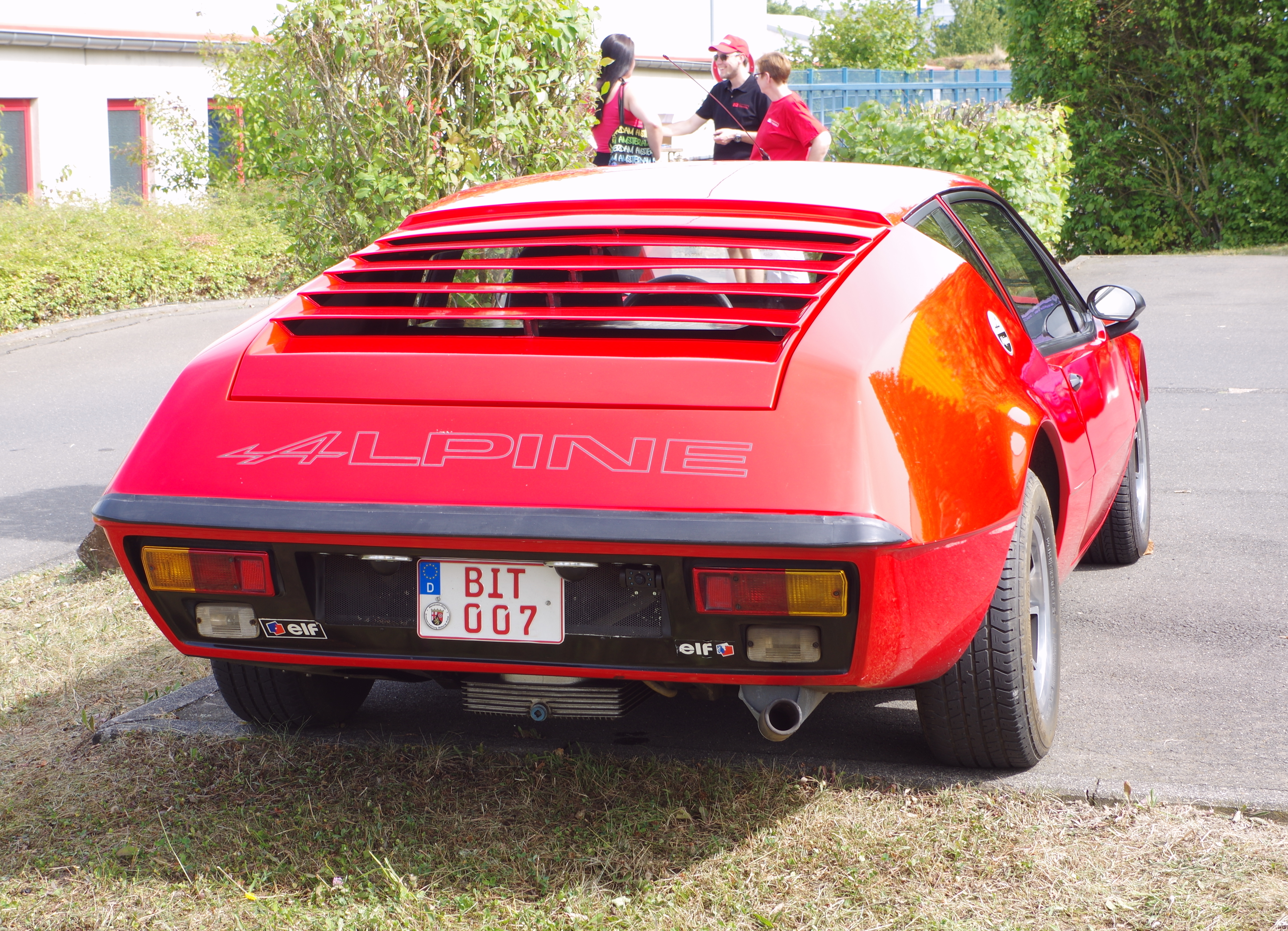 Renault Alpine A310, 1974, 1600cm³, 4 Zyl. , Bitburg Classic 2016, Das Nummernschild ist verfälscht!